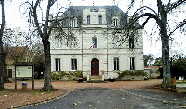 Marie à la place de la Mairie de Saint-Genest d'Ambière, le 29 novembre 2015